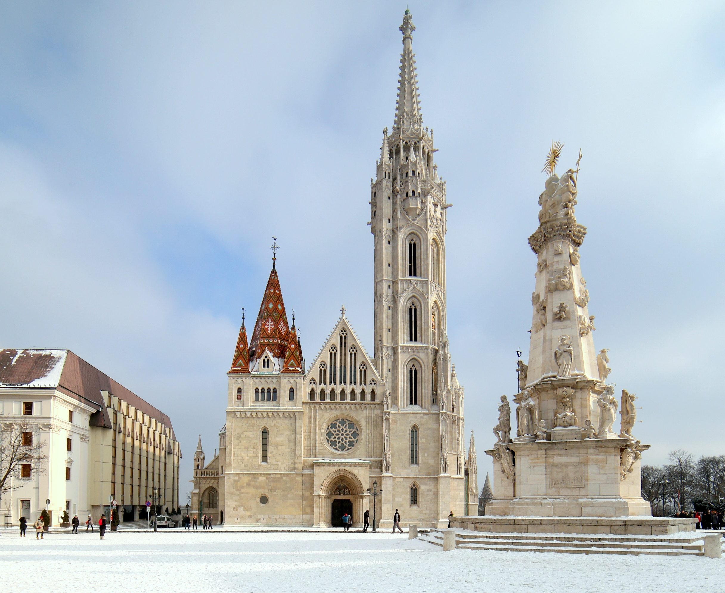 Mátyás-templom 2016 januárban